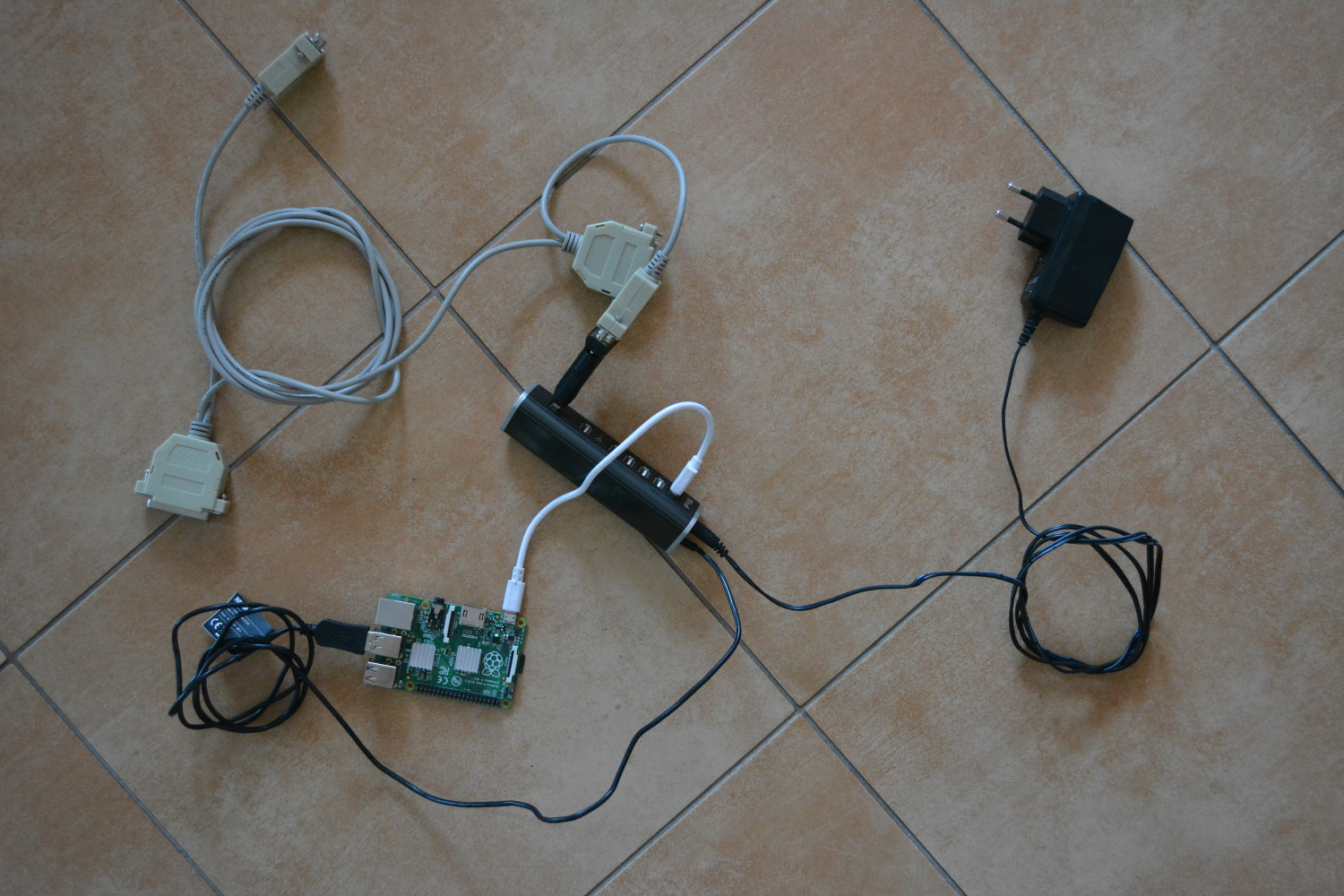 PiPort sestava